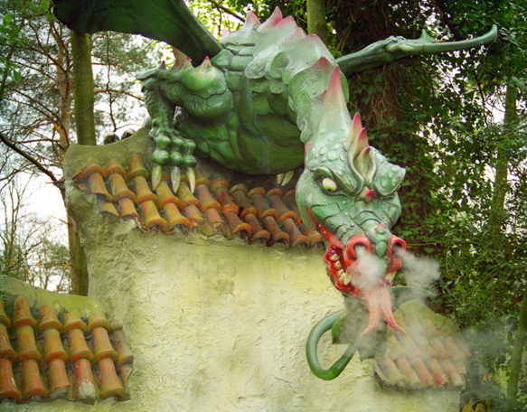 Efteling Sprookjesbos Draak